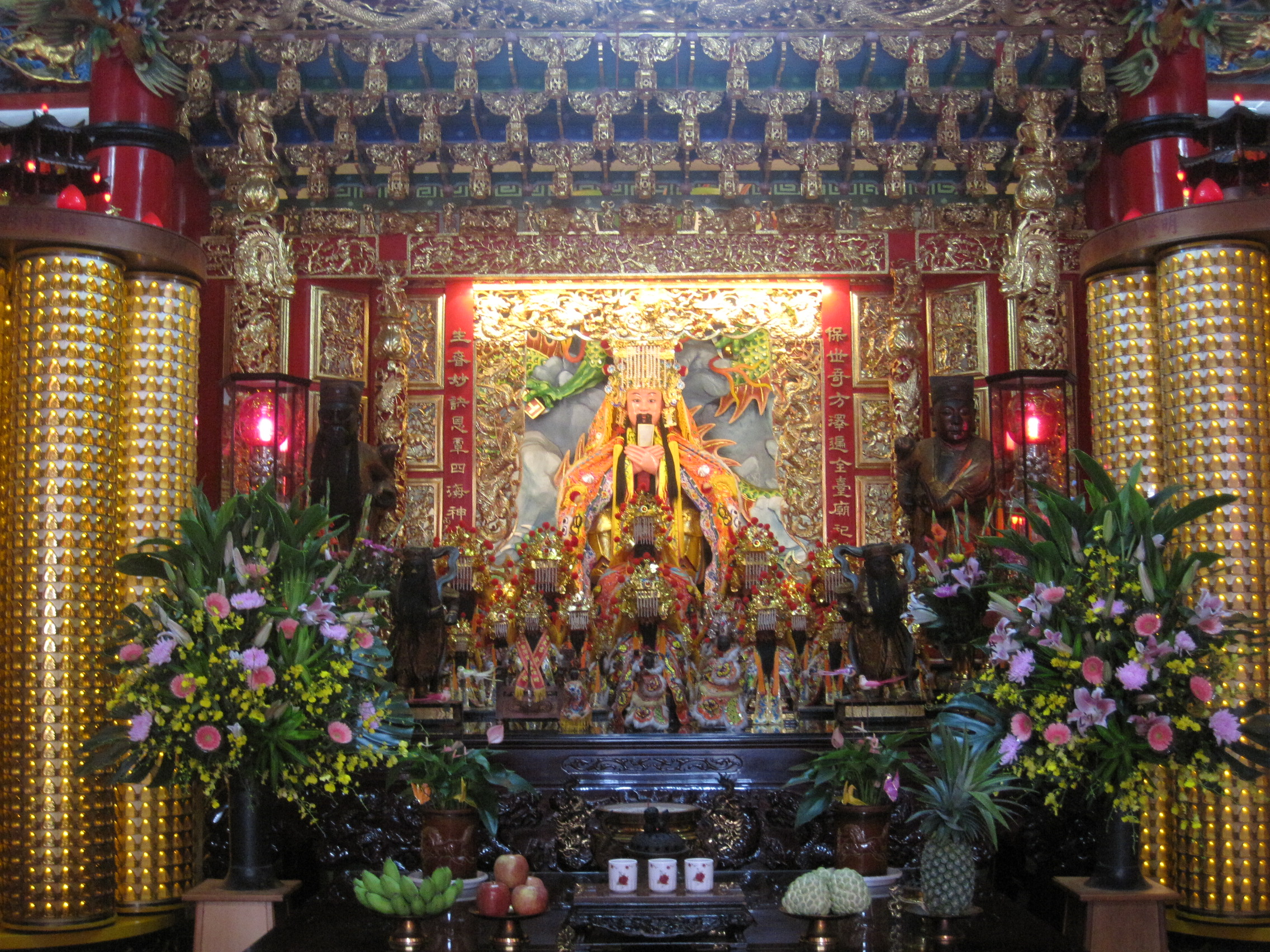 歸仁仁壽宮內部